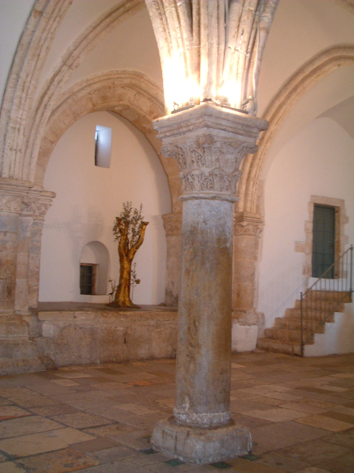 Jerusalem, Coenaculum, Abendmahlssaal, Cenacle